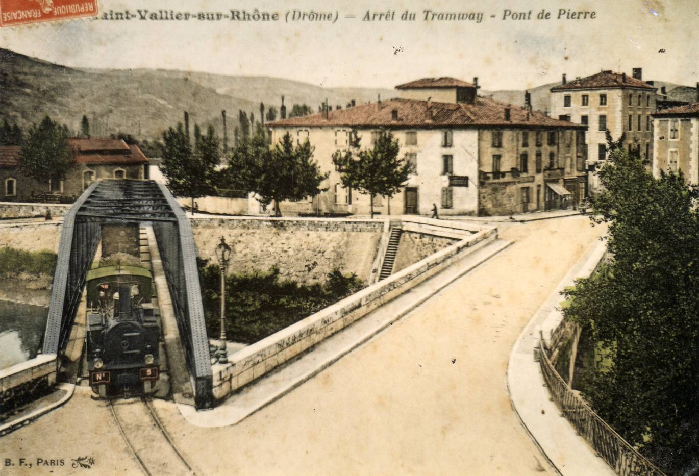 Carte postale ancienne éditée par BF à Paris :SAINT-VALLIER-SUR-RHÔNE - Arrêt du Tramway - Pont de Pierre